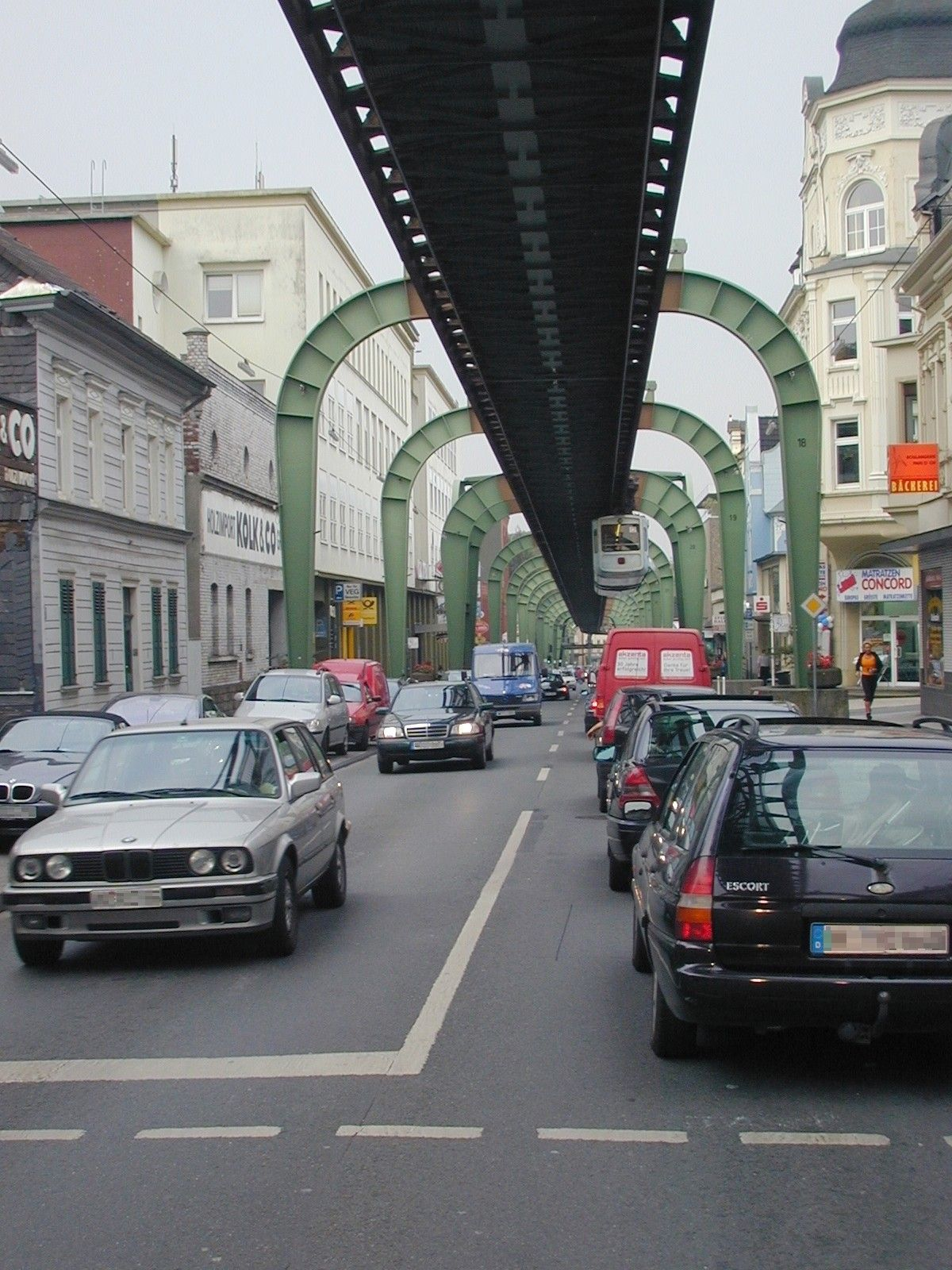 Schwebebahn in Wuppertal-Vohwinkel